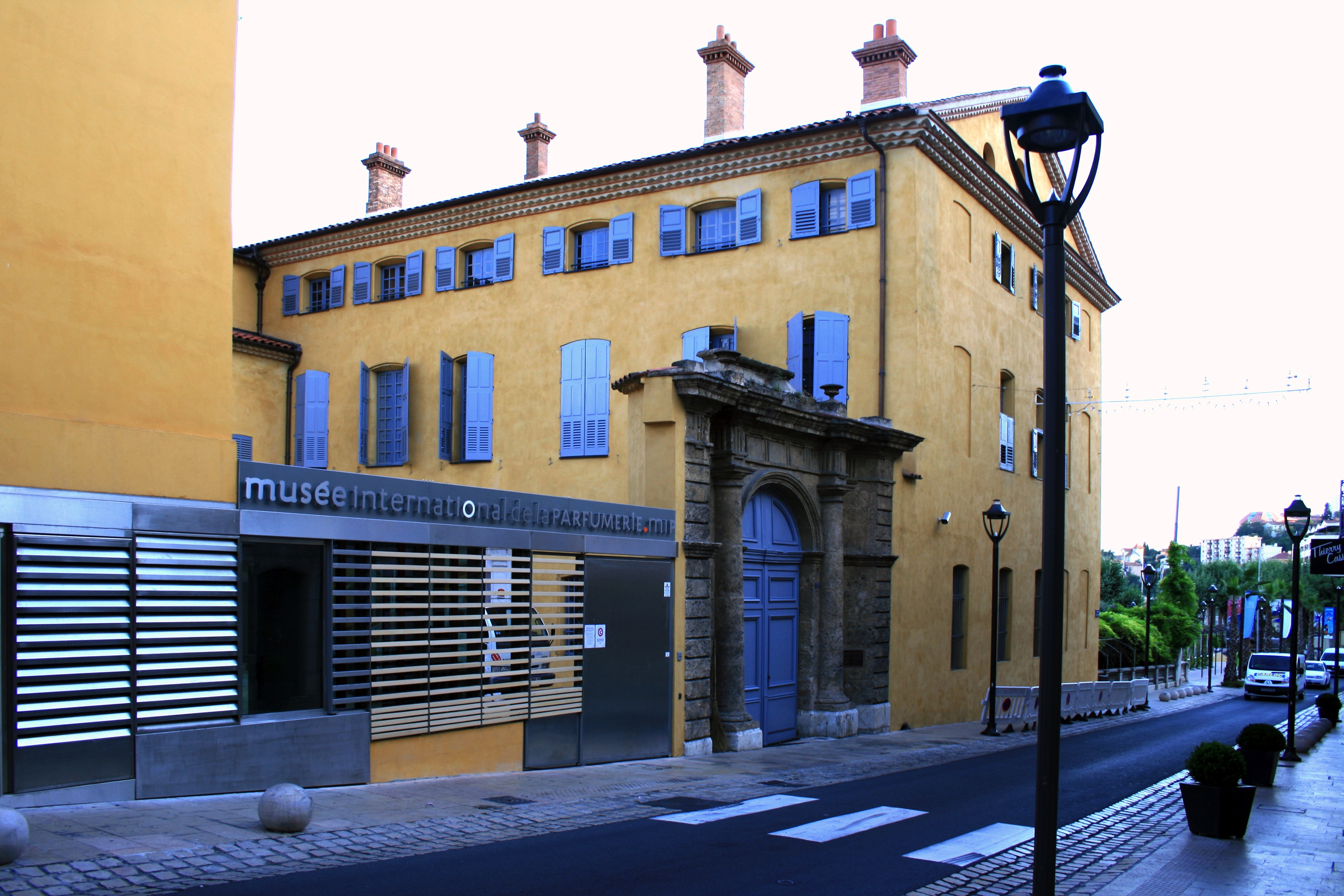 Musée International de la Parfumerie